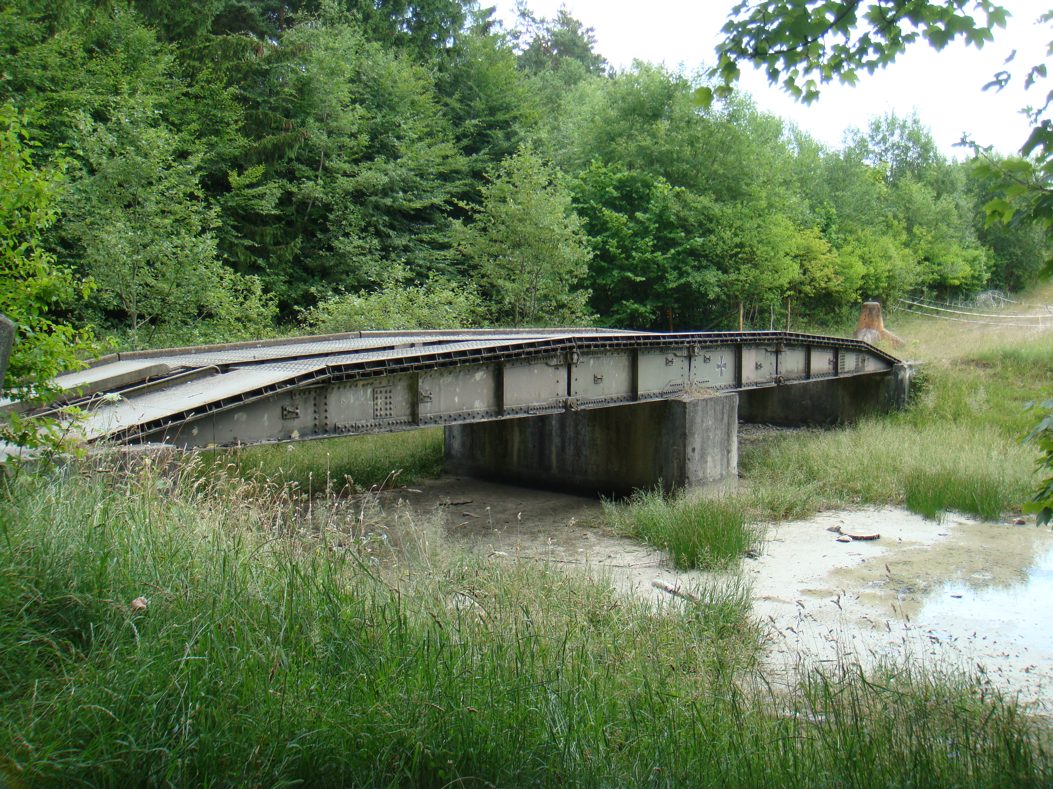 Panzerschnellbrücke M48